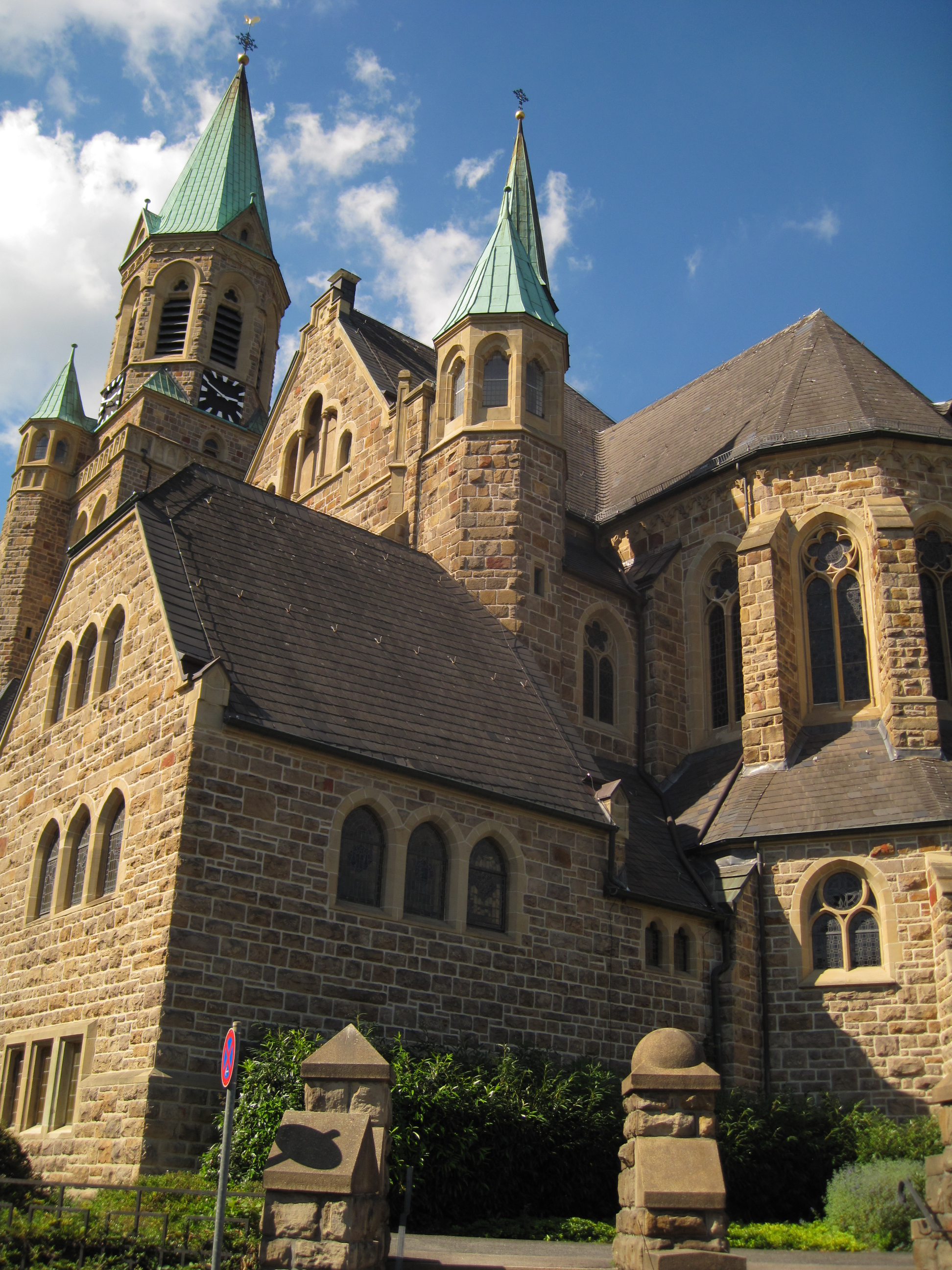 St. Kilian in Iserlohn-Letmathe, Hagener Straße.